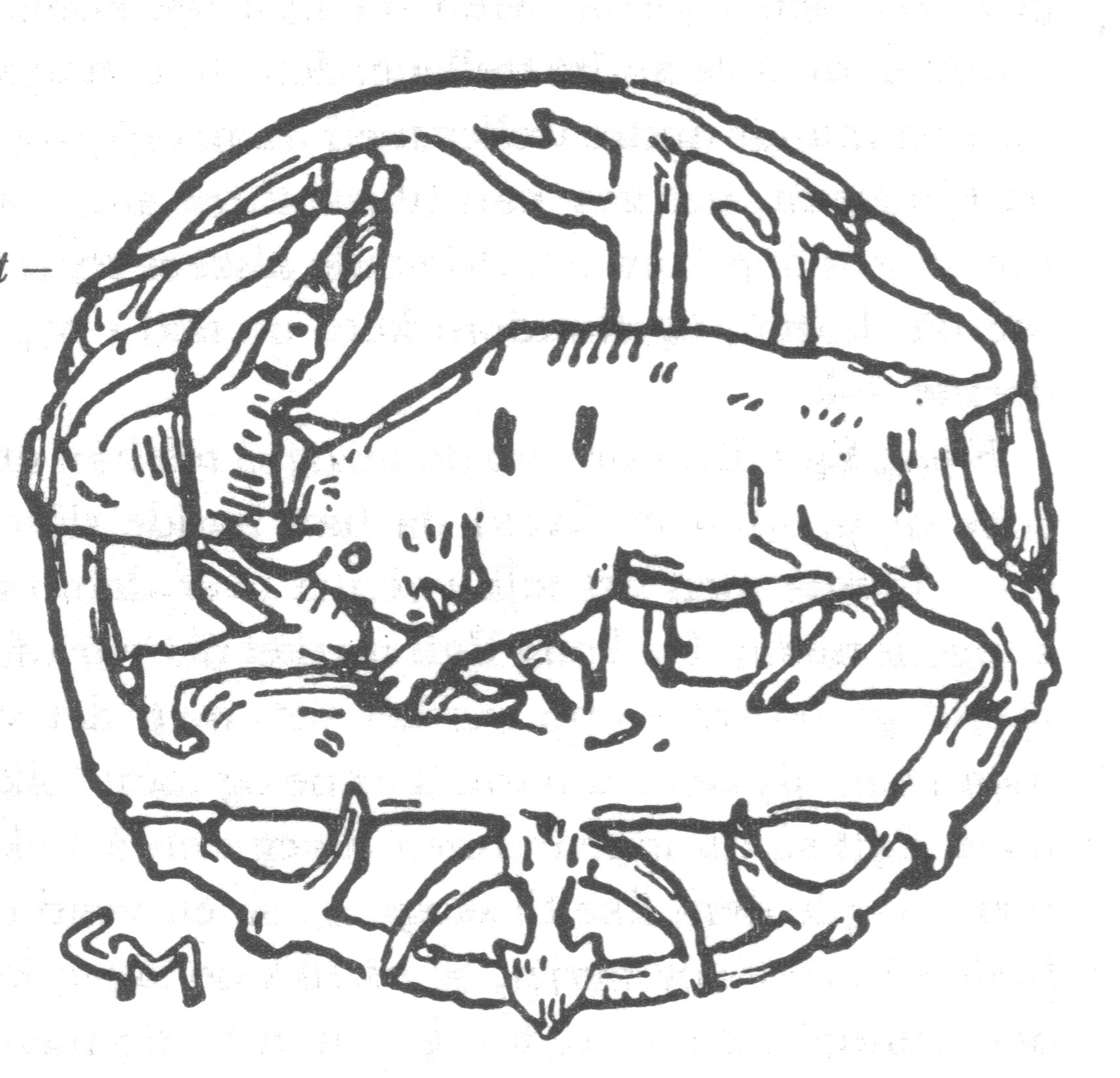 Gerhard Munthe: Illustration for Ynglingesaga. Snorre 1899-edition. 17 Kong Egil blir stanget av oksen.